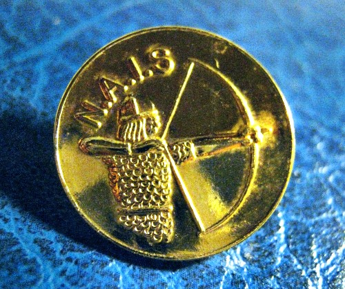 Norsk NAIS-gullmerke advers